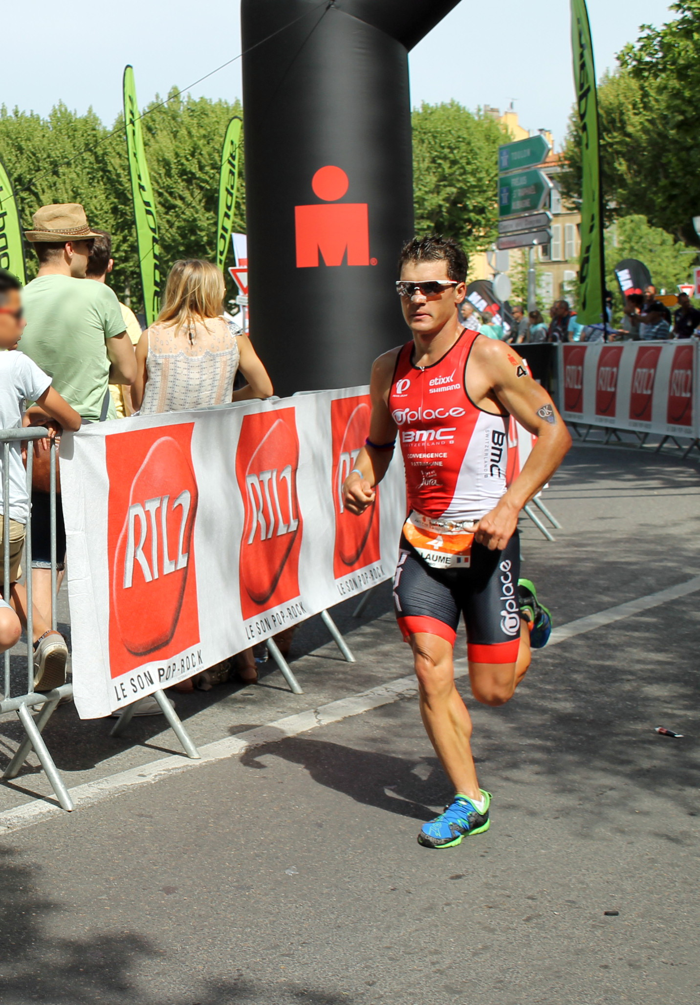 Ironman 70.3 Pays d'Aix 2015